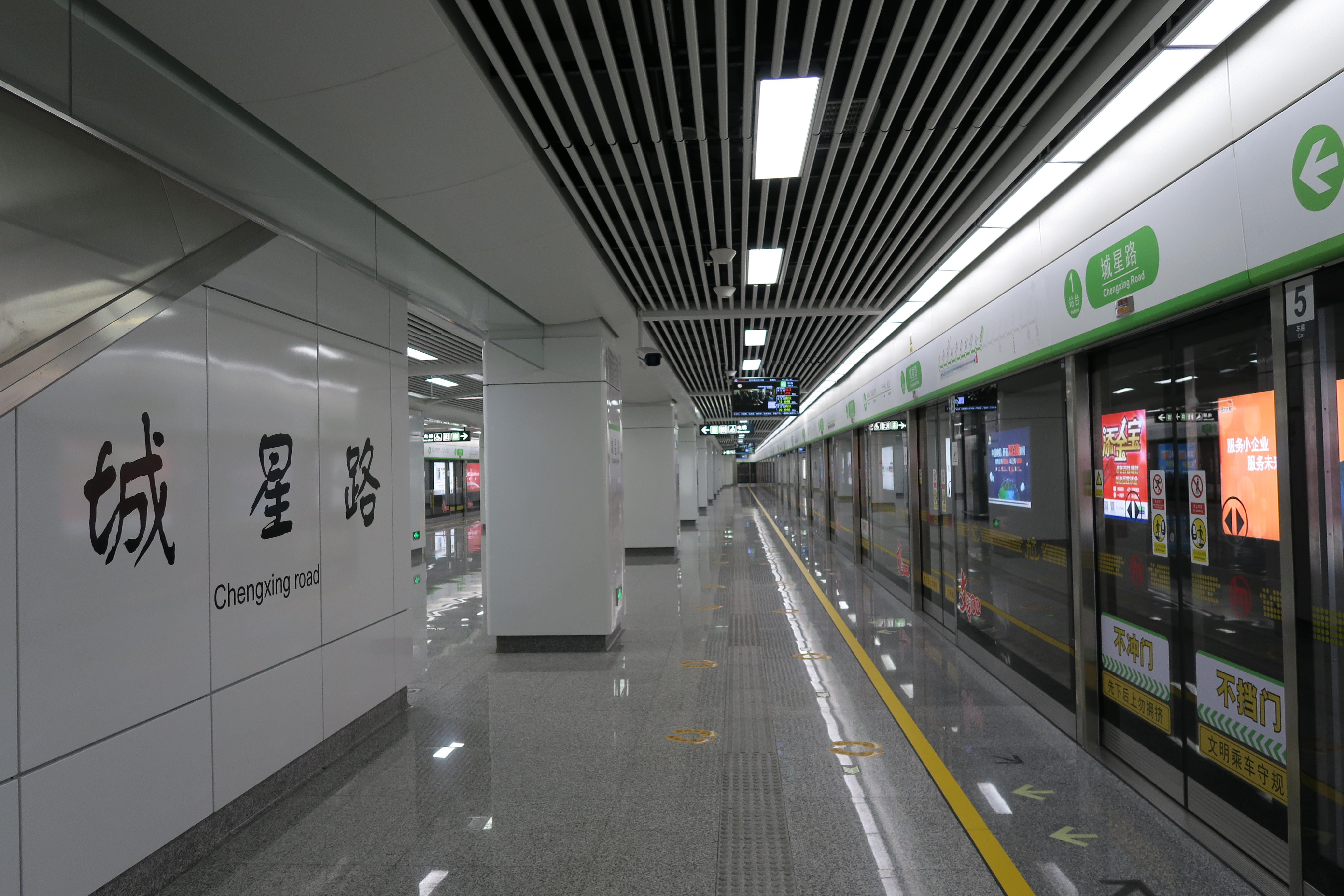 杭州地铁城星路站